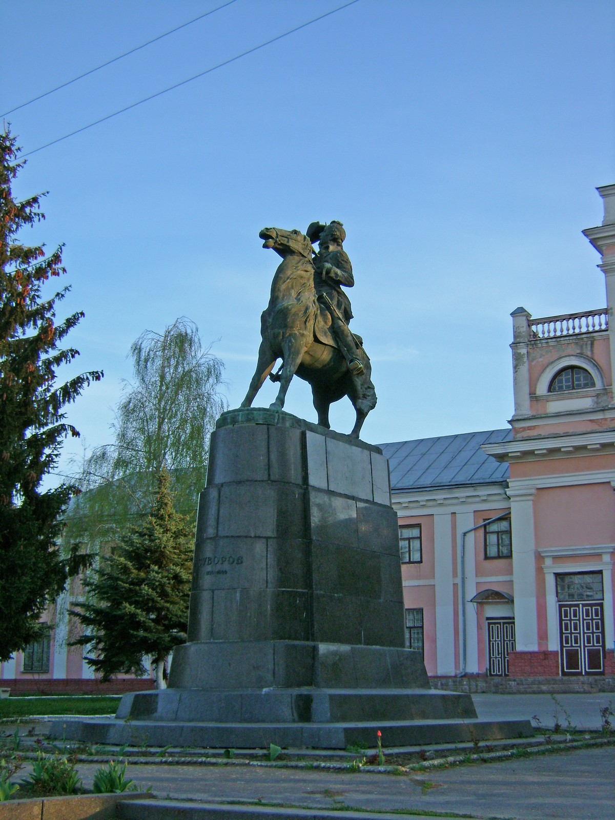 Памятник О.В.Суворову у м.Тульчин, 1954. Модель скульптора Бориса Едуардса (1860—1924)